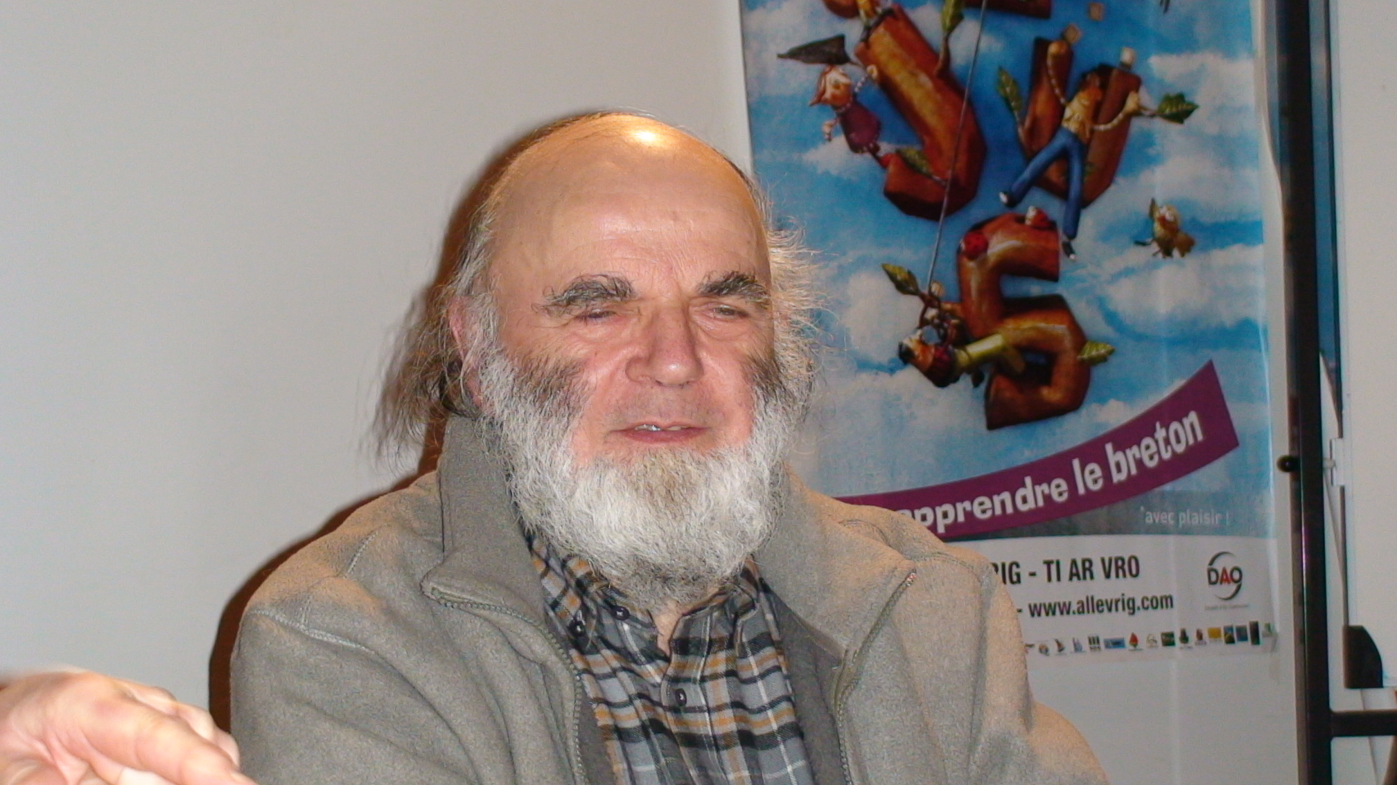 Fañch Peru e Kawan.